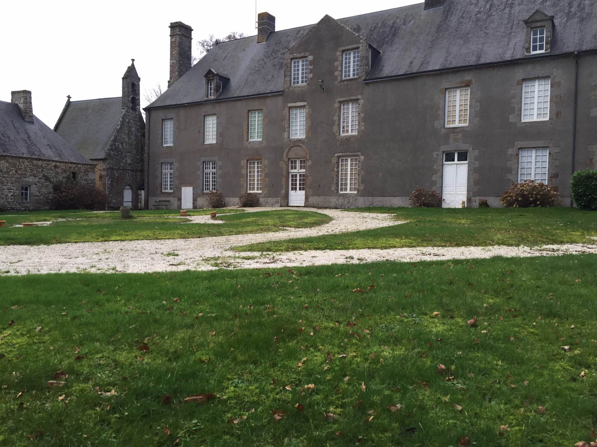 Château du Fresne